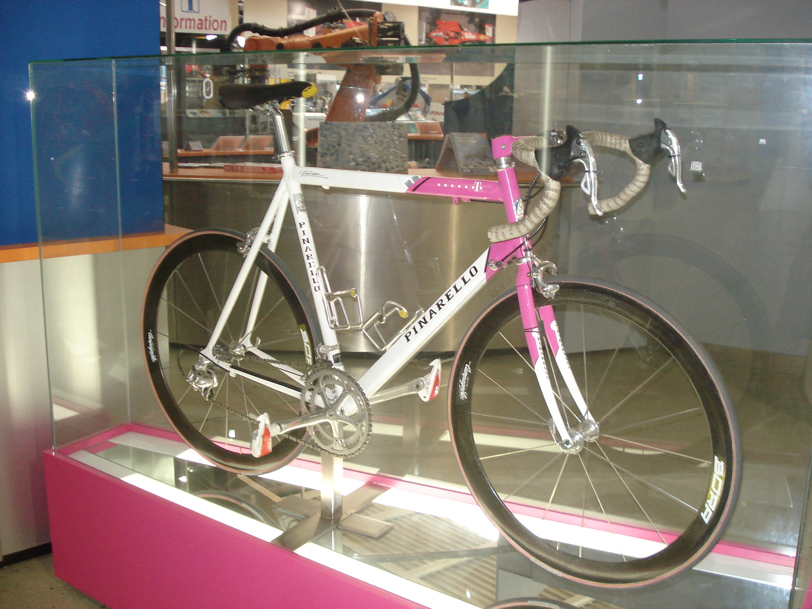 Jan Ullrichs Rennrad von 1997 im Technik Museum Speyer